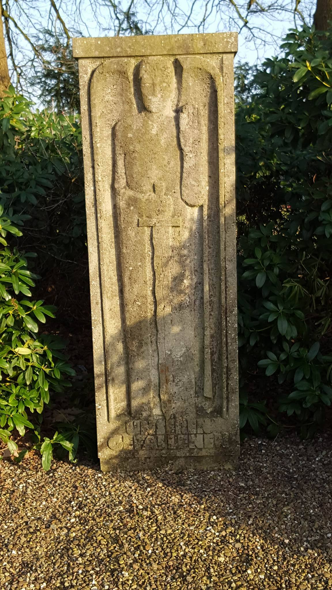 Das Ehrendenkmal auf dem Appelner Friedhof zum Gedenken der gefallenen Soldaten aus beiden Weltkriegen. (Foto: 16.03.2017)